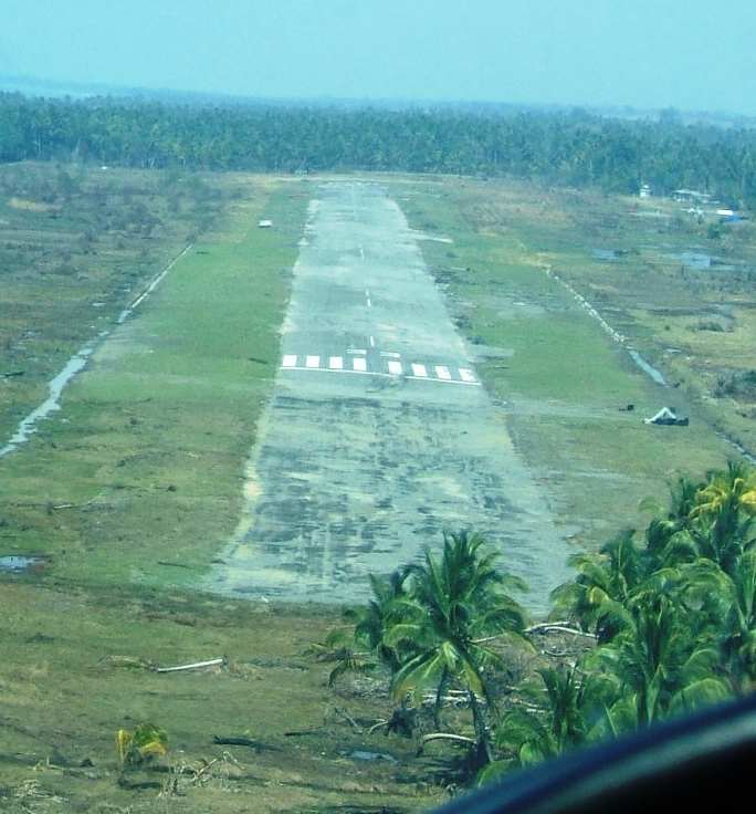 piste aéronautique en Indonésie, aérodromes secondaires (sans tour de contrôle), radiocommunication sur fréquence d'auto-informations.